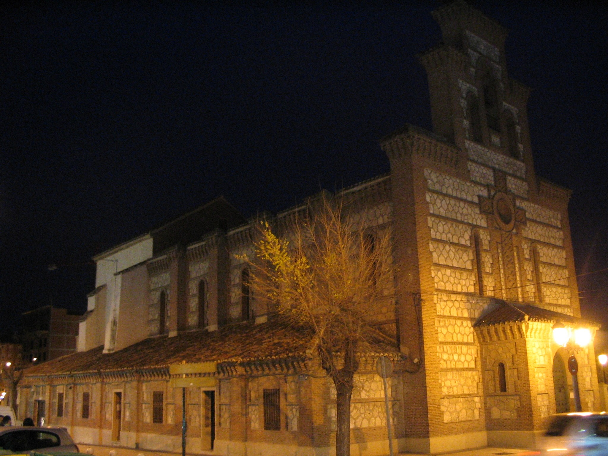 Foto de la Iglesia Vieja de Parla, tomada de noche en marzo de 2005